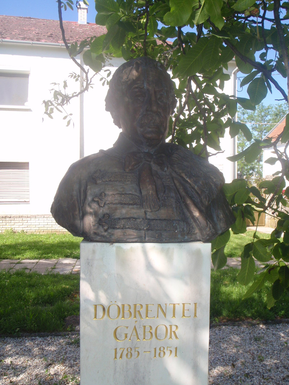 Döbrentei Gábor mellszobor Somlószőlős, avatva 1995. október 29.